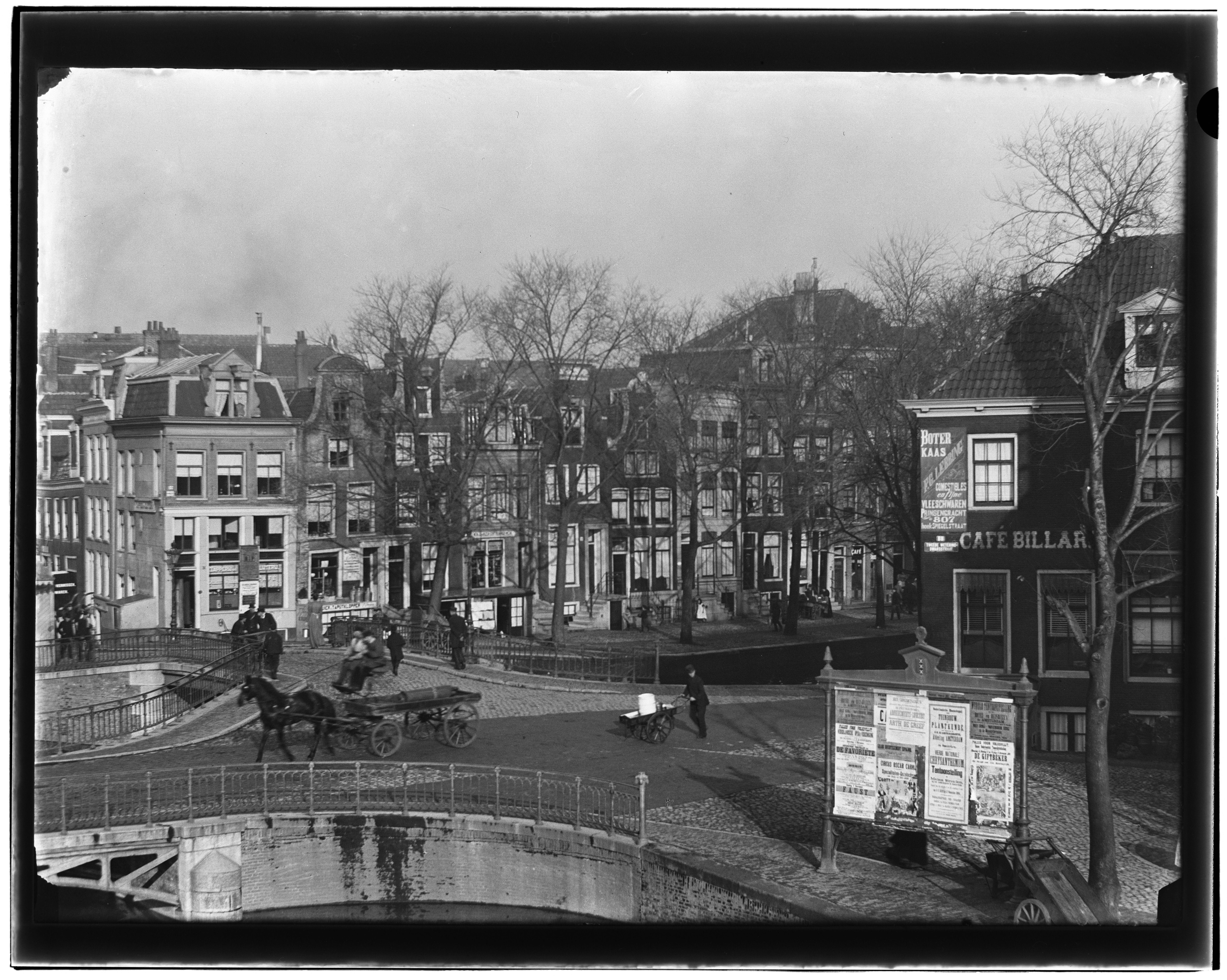 Beschrijving Spiegelgracht 27(ged.``,rechts) Gezien vanaf Lijnbaansgracht. Op de voorgrond: brug nr.97 en links daarachter:brug nr.88 naar Korte Leidsedwarsstraat. De huizen zijn ook Spiegelgrachtnrs.20A t/m 28 (v.r.n.l.) Documenttype foto Vervaardiger Olie``, Jacob (1834-1905) Collectie Collectie Jacob Olie Jbz. Datering 6 november 1894 Geografische naam Spiegelgracht Inventarissen Afbeeldingsbestand 10019A000210 Generated with Dememorixer